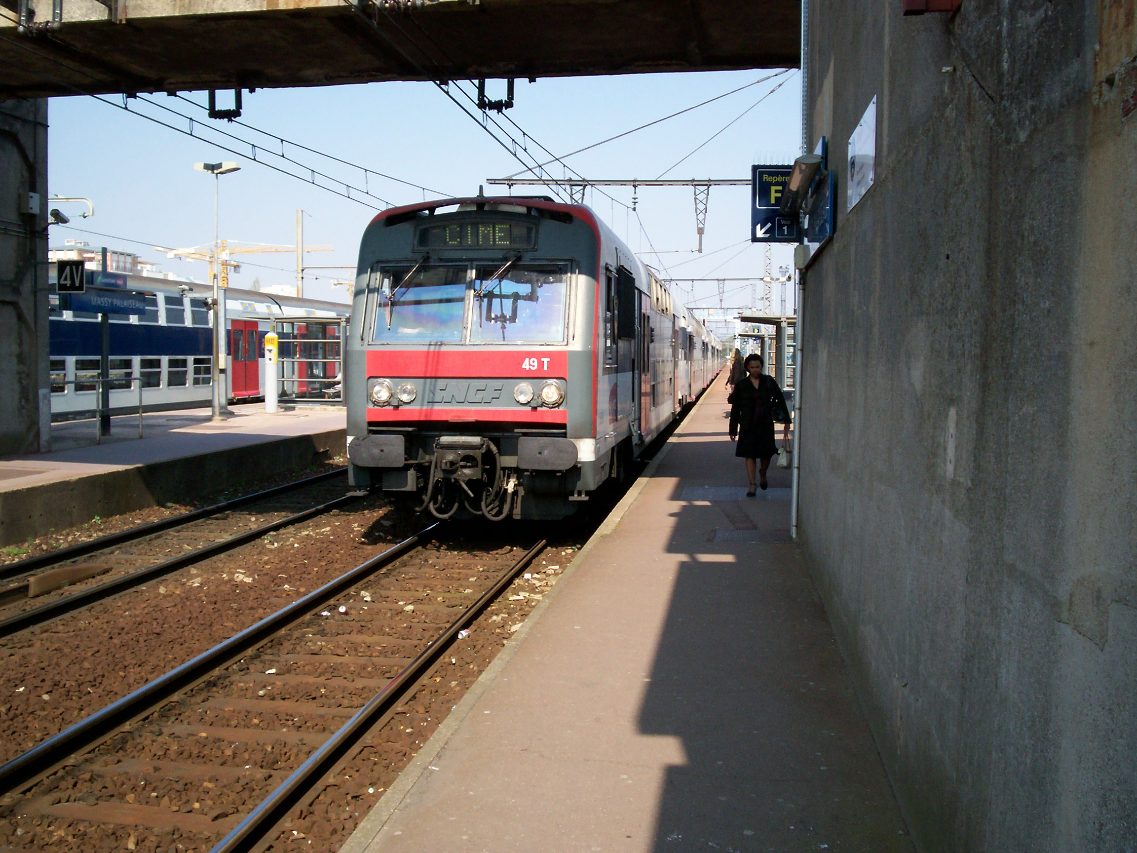 Z 5600 assurant la mission CIME à Massy-Palaiseau